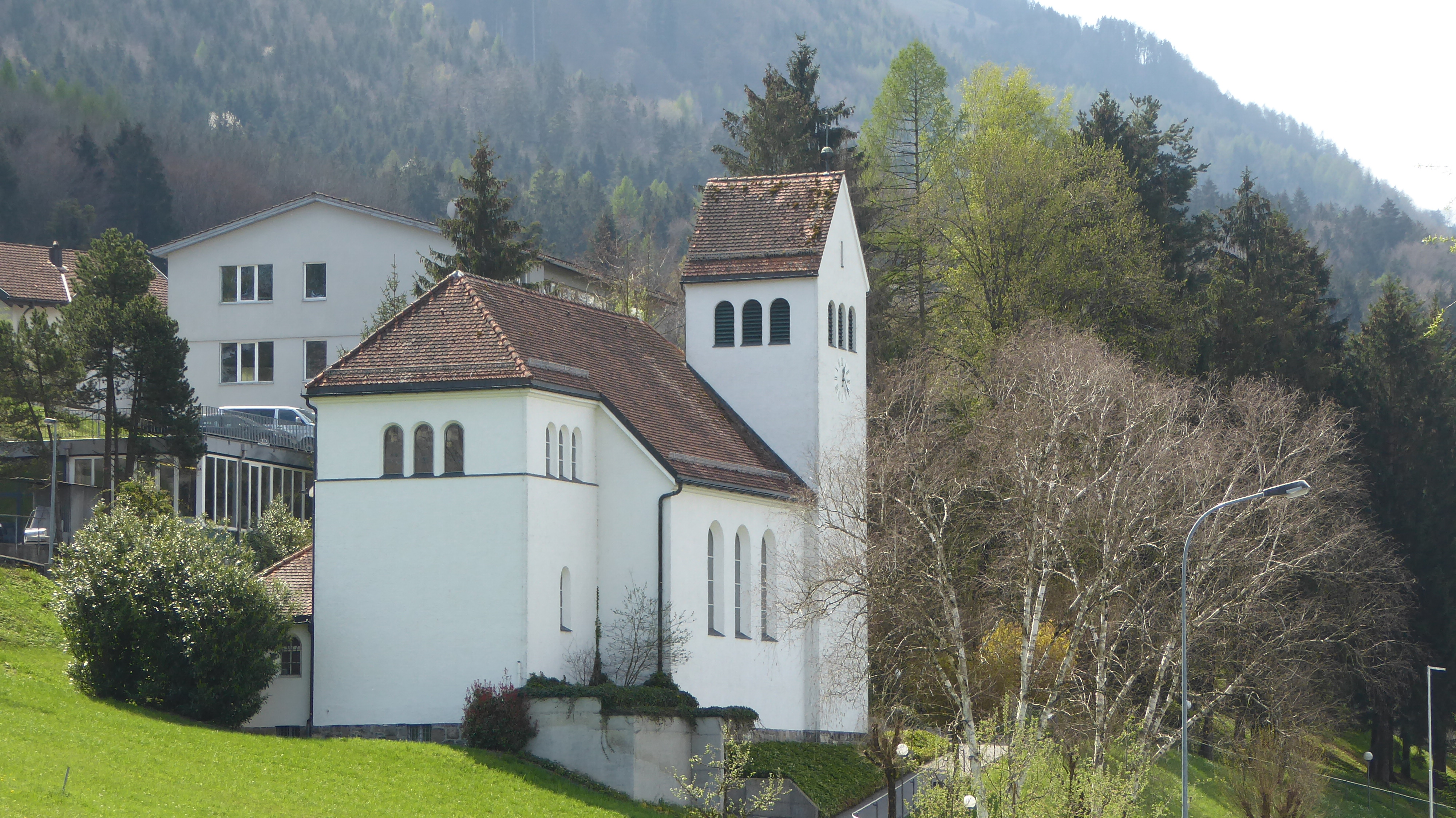 Kapelle St. Theresia von Lisieux (Theresienkirche), Schaanwald, Liechtenstein